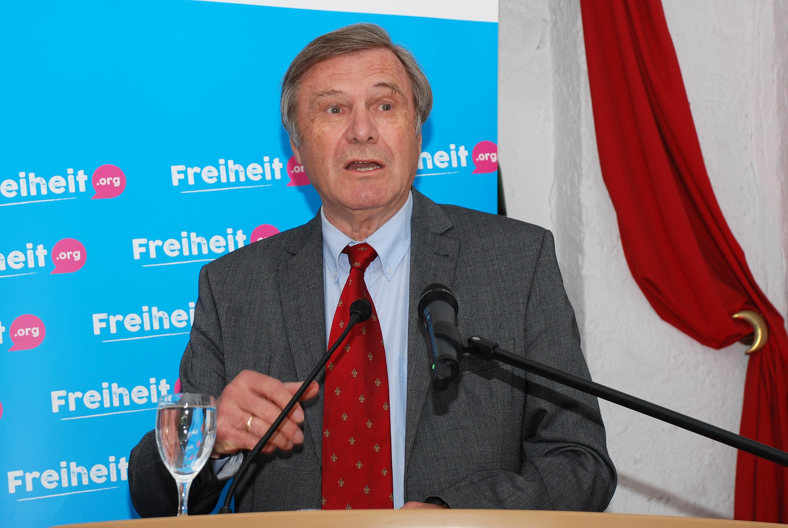 Wolfgang Gerhardt